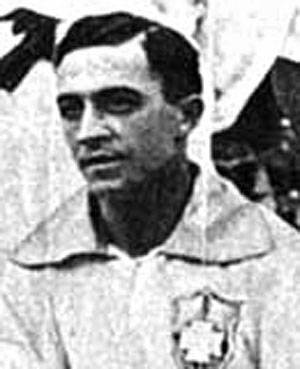 Arthur Friedenreich 1919 - Copa América